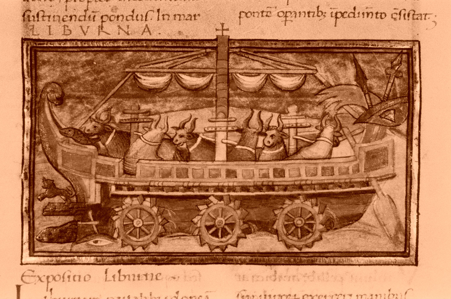 Barco con seis ruedas tracción animal: De Rebus Bellicis: obra año 364-378 dc autor latino desconocido - sepia.